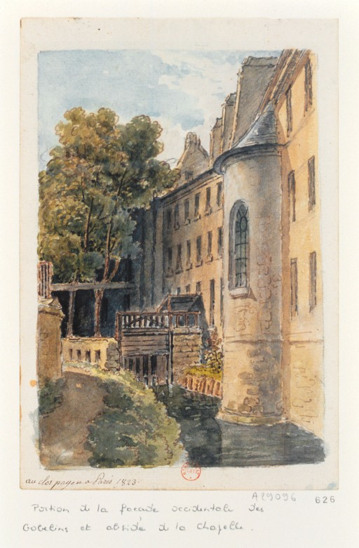 Paris (Seine, France) : Vue de l'arrière de la Manufacture des Gobelins et abside de la chapelle.